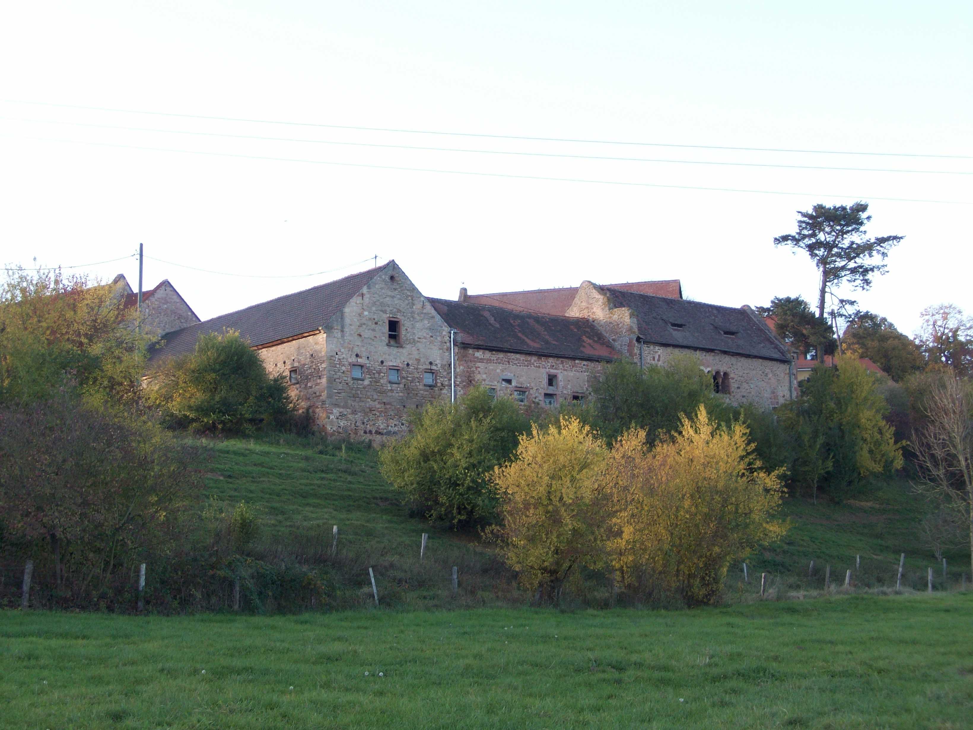 Die Ostseite des ehemaligen Klosters Konradsdorf; ganz rechts die ehemalige Propstei